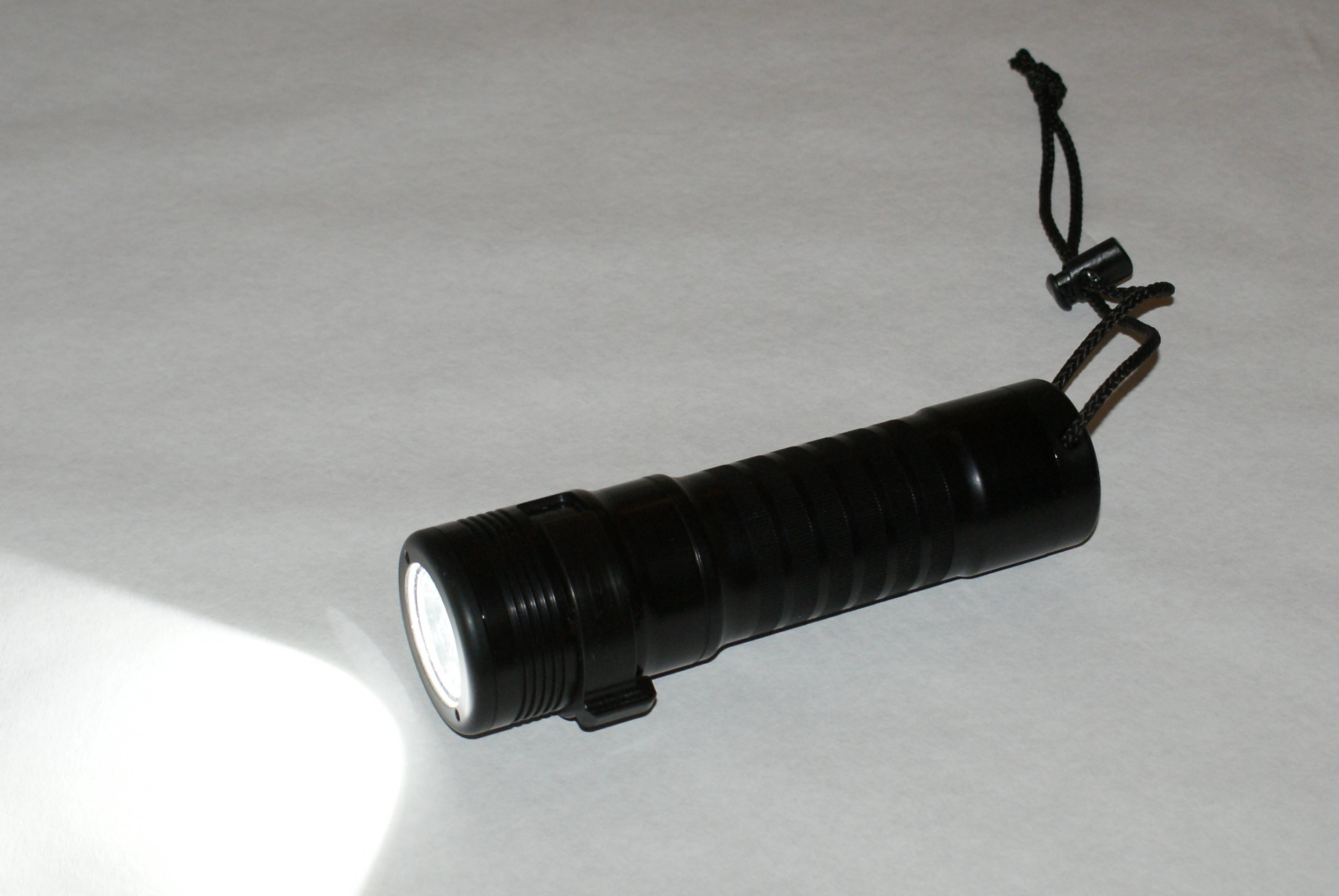 LED-Taucherlampe: mb-sub Photon